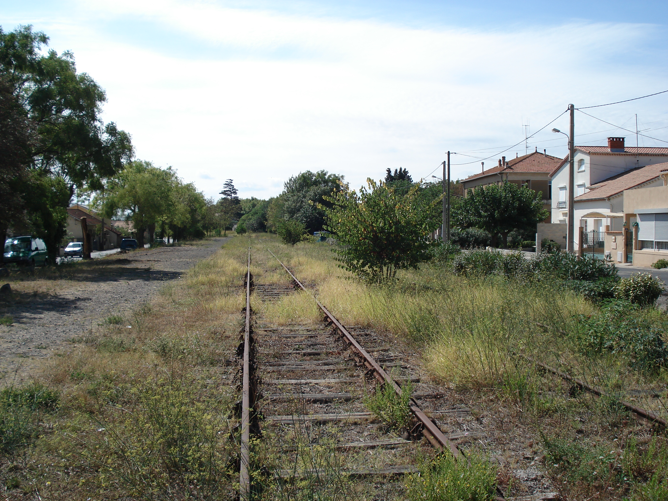 La voie en provenance de Montpellier en gare de Paulhan.